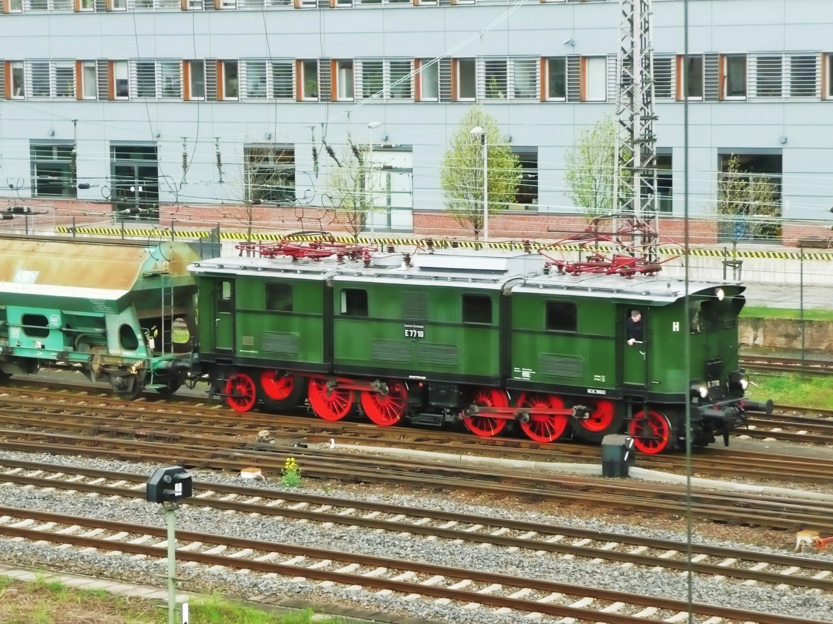 E 77 10 beim Dampflokfest Dresden